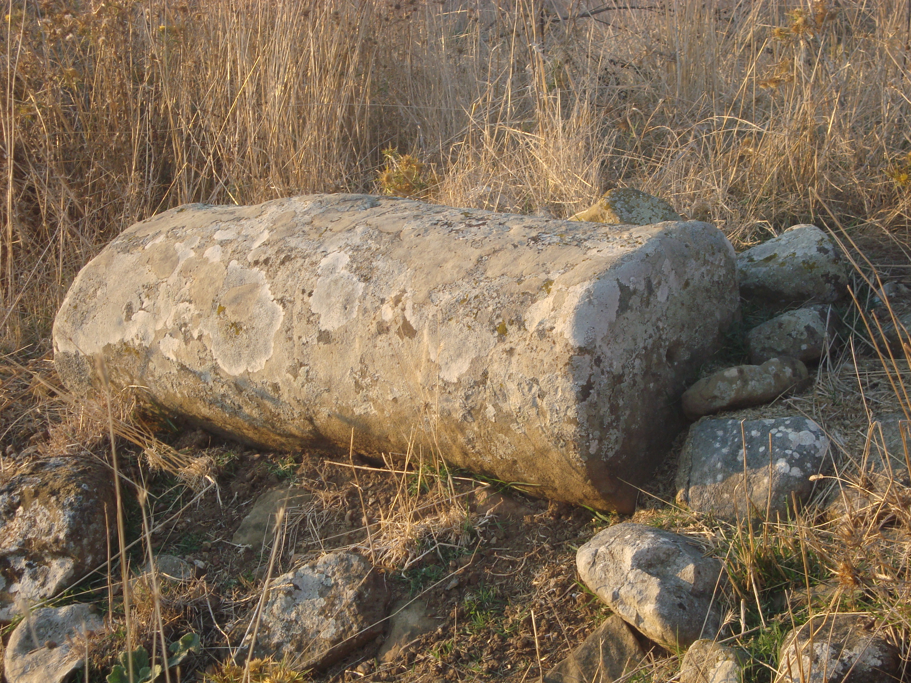 αρχαία κολόνα , αρχαία Τριτεια